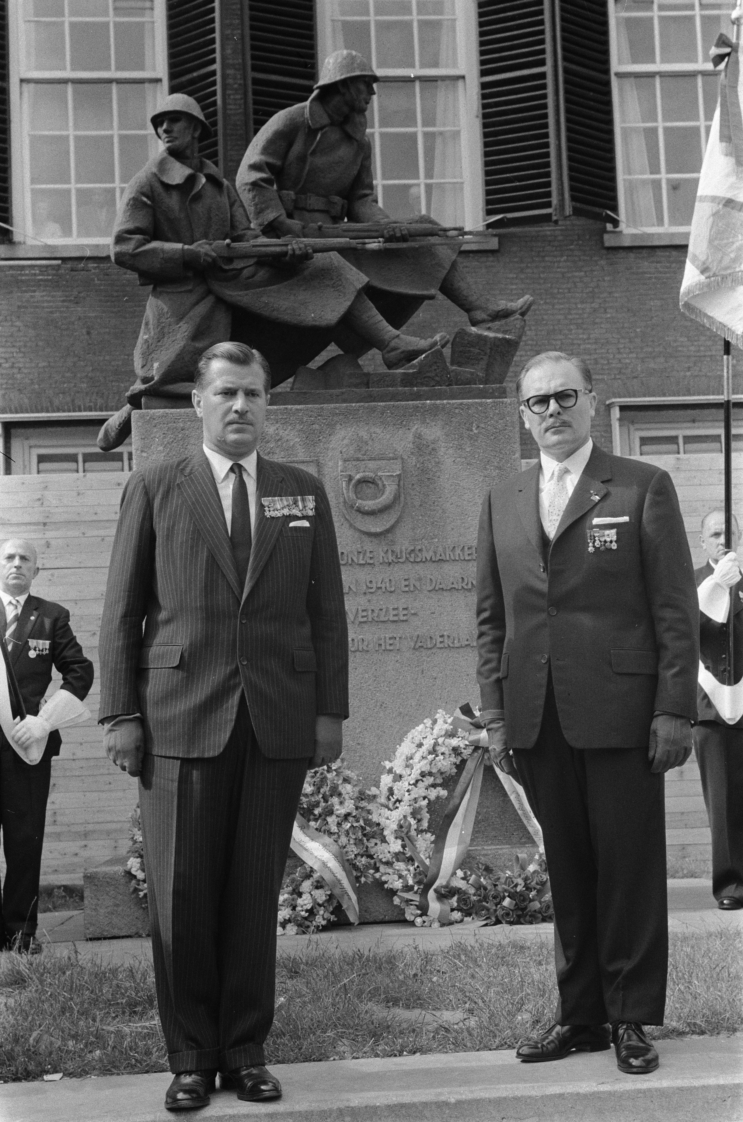 Collectie / Archief : Fotocollectie Anefo Reportage / Serie : [ onbekend ] Beschrijving : Bond van Nederlandse Militaire Oorlogsslachtoffers herdenkt derde lustrum Datum : 11 juni 1960 Persoonsnaam : Bond van Nederlandse Militaire Oorlogsslachtoffers Fotograaf : Pot, Harry / Anefo Auteursrechthebbende : Nationaal Archief Materiaalsoort : Negatief (zwart/wit) Nummer archiefinventaris : bekijk toegang 2.24.01.05 Bestanddeelnummer : 911-3310